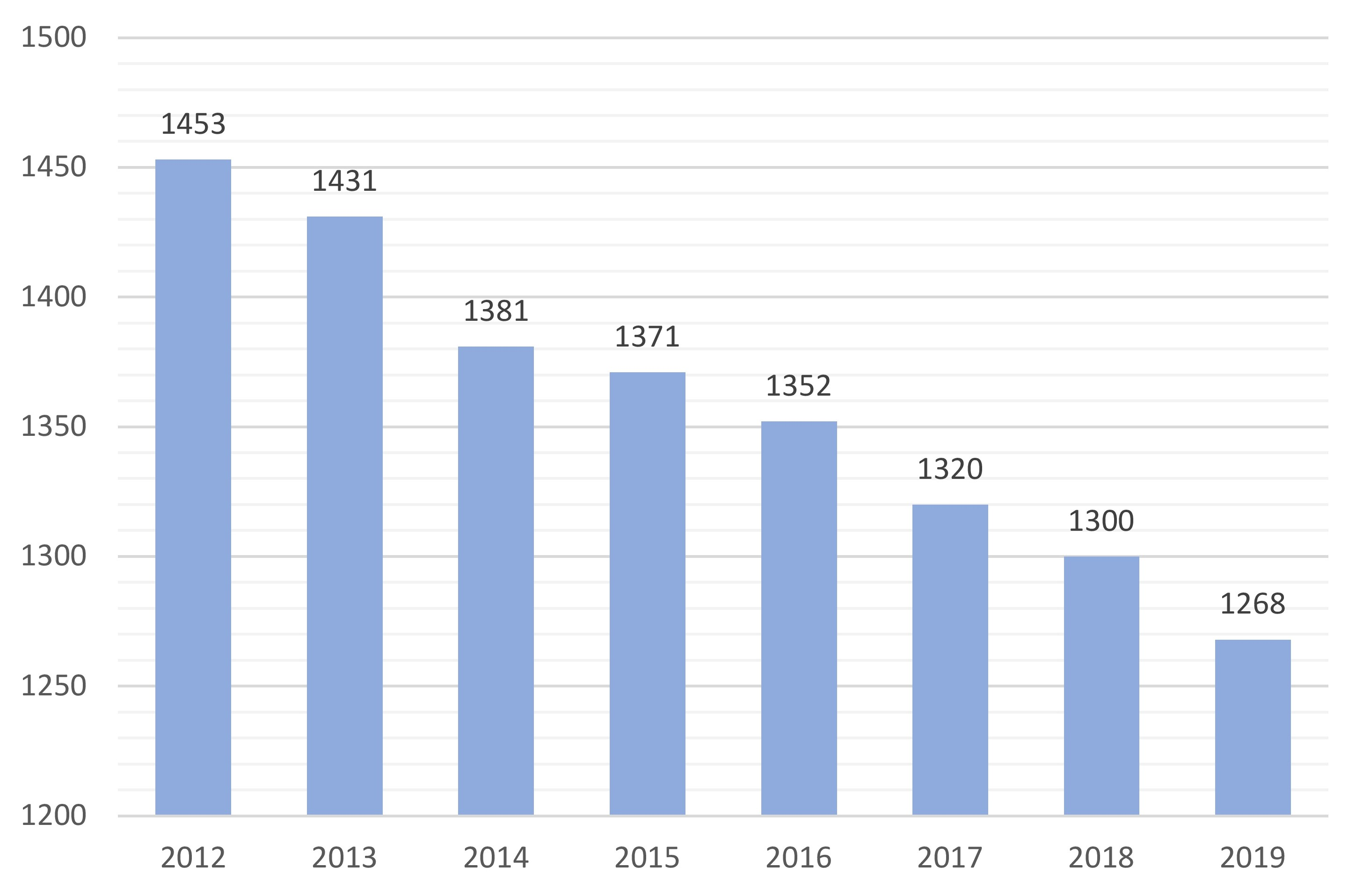 Popolazione di Albidona al 1° gennaio (2012-2019)